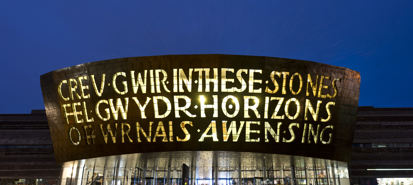 Millennium Centre